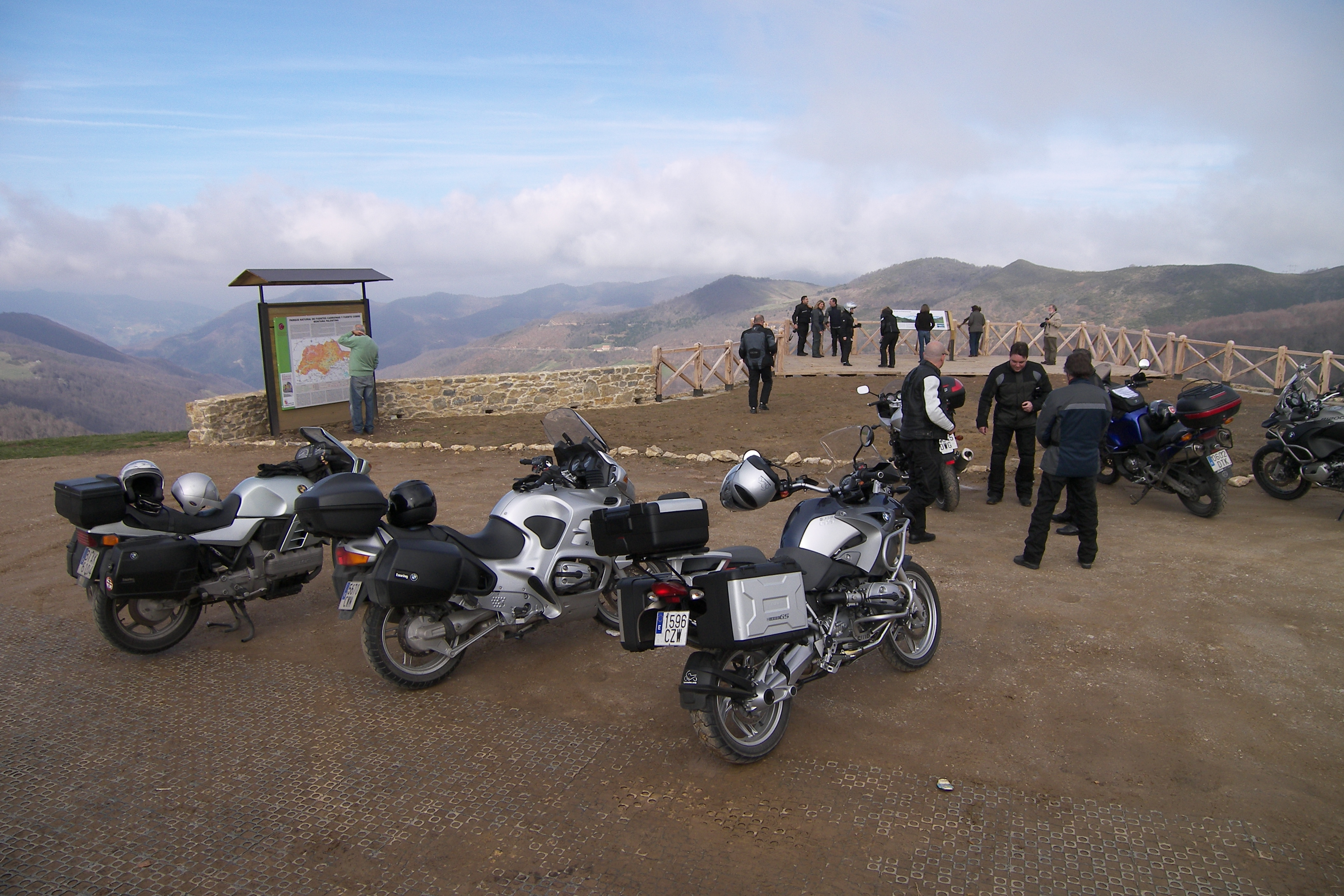 Mirador en el puerto de Piedrasluengas, entre las provincias de Palencia y Cantabria, en España.